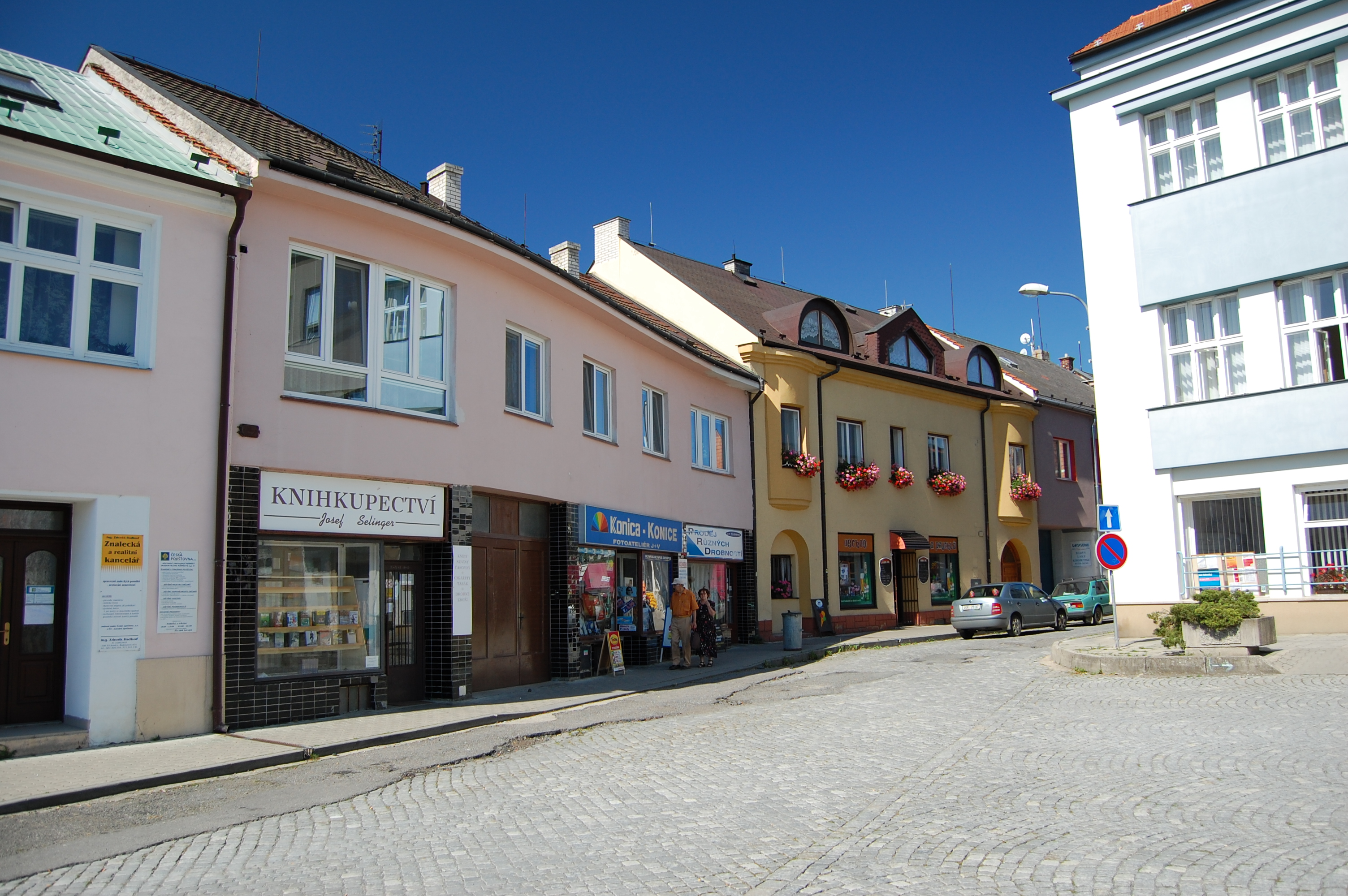 Ulice vedle radnice, Konice, okres Prostějov